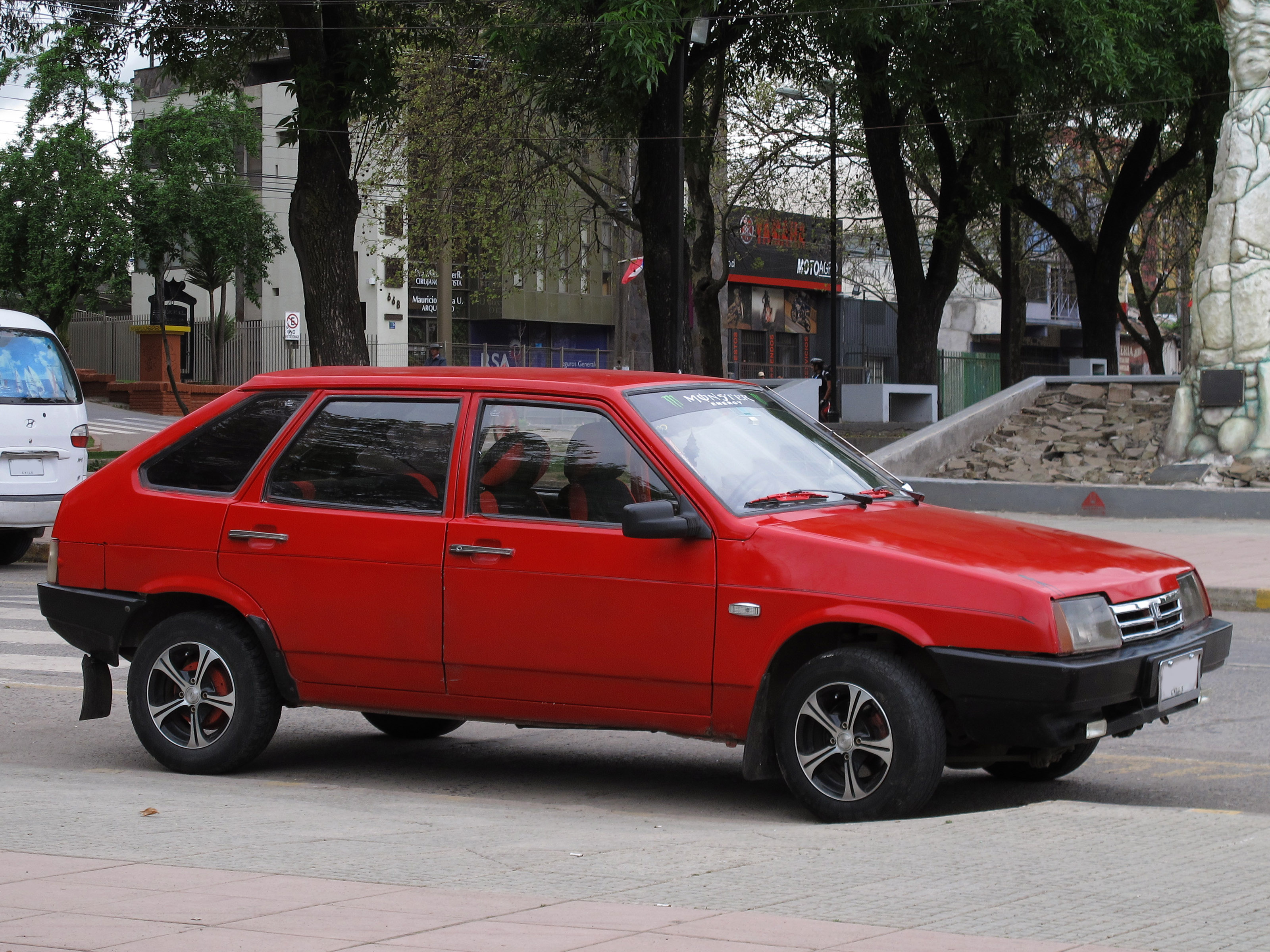 Lada Samara 1500 1993